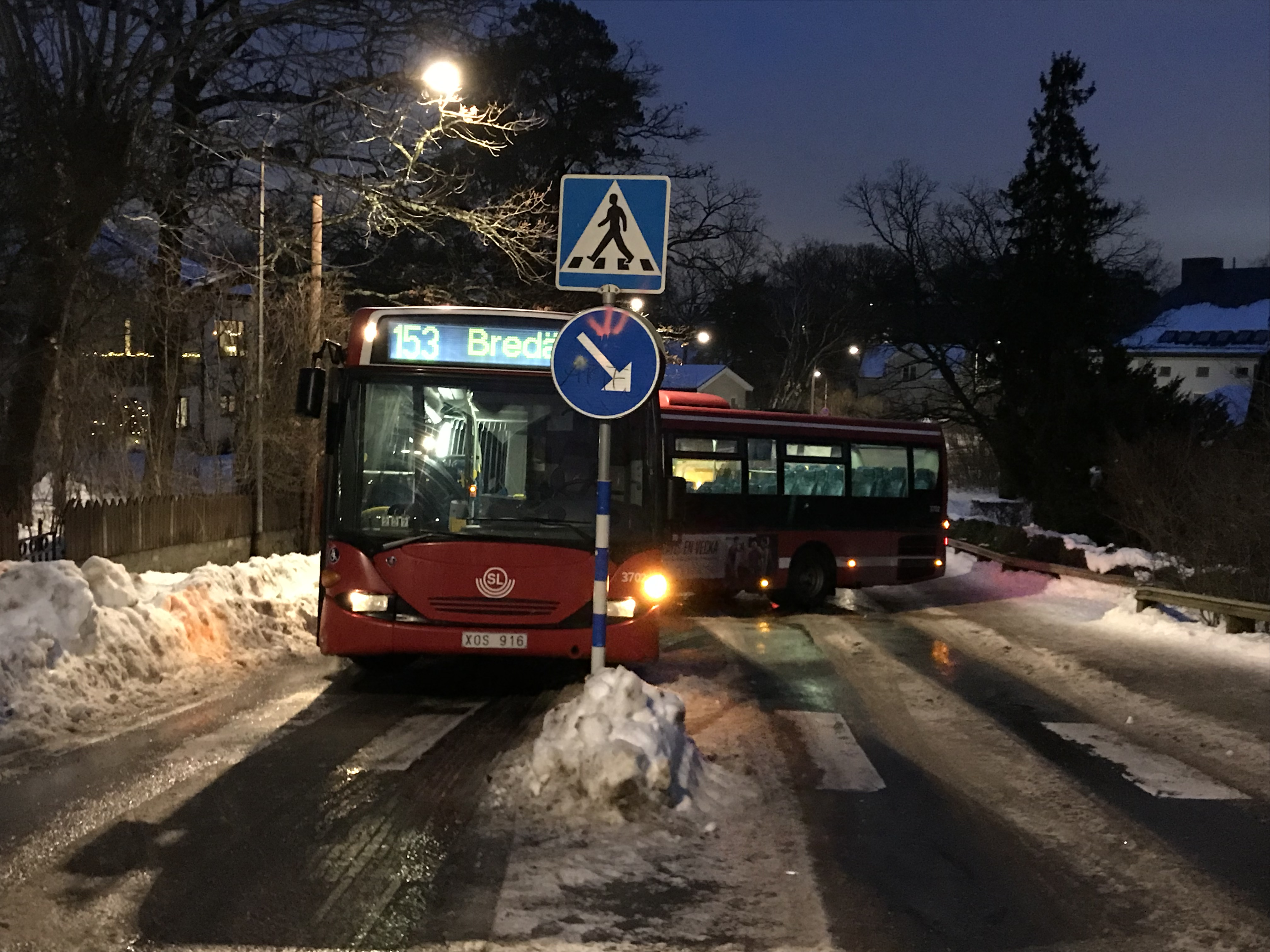 Bakdelen av en ledbuss av märket Scania har halkat in på fel körbana på Mälarhöjdsvägen vid en backningsmanöver, 7 februari 2019